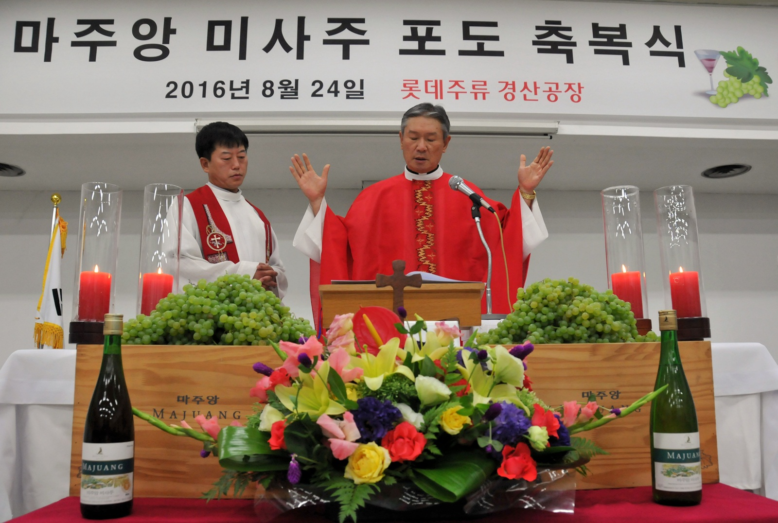 마주앙 미사주 축복식 2016